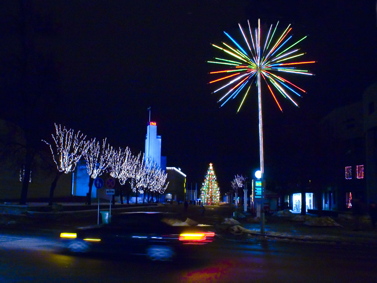 Alytus žiemą